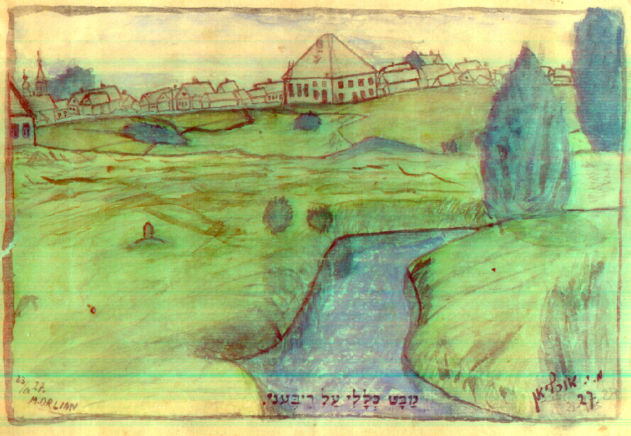 ציור של העיירה רייביני, שצויר ע"י בן העיירה, מאיר אור.